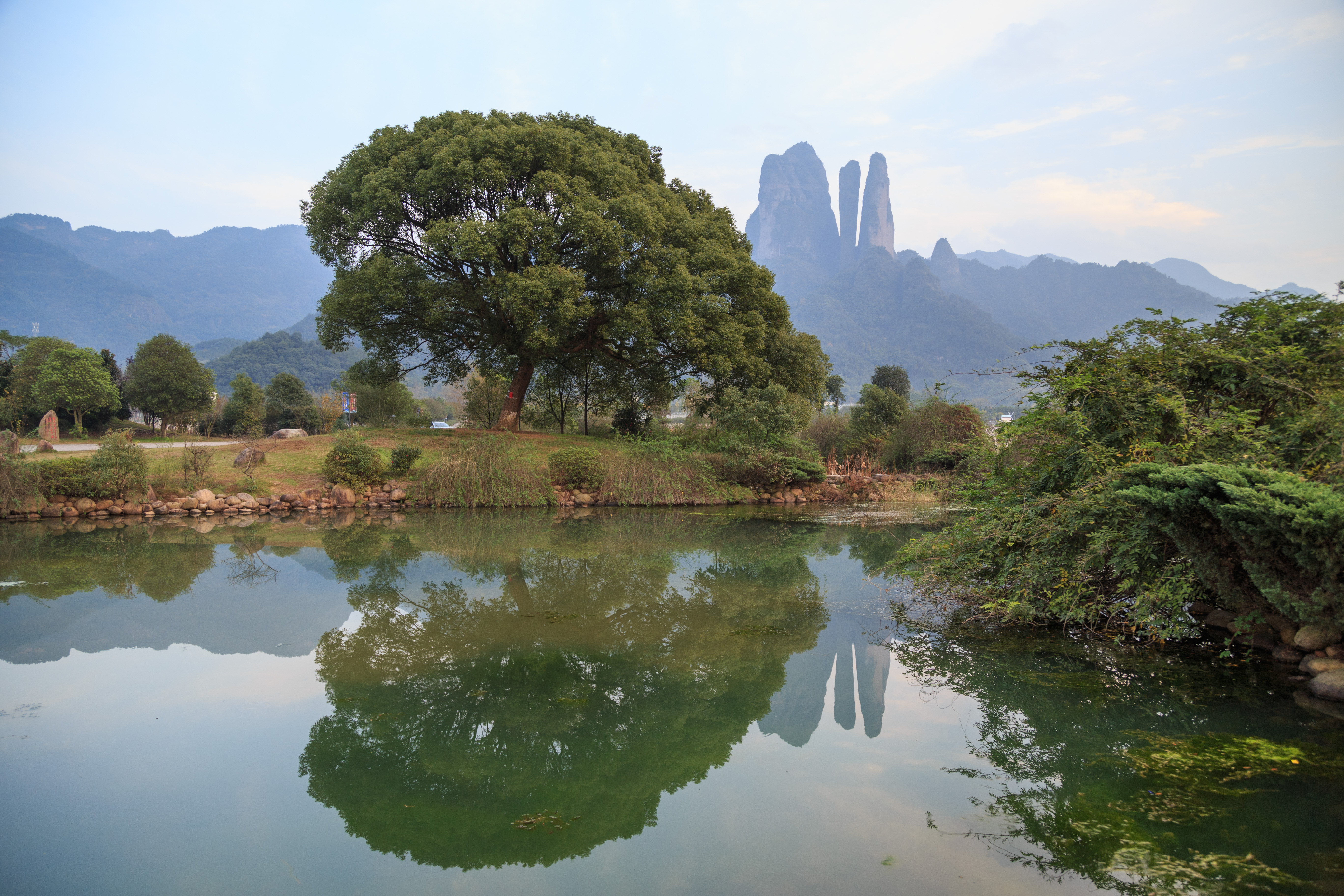 江郎山